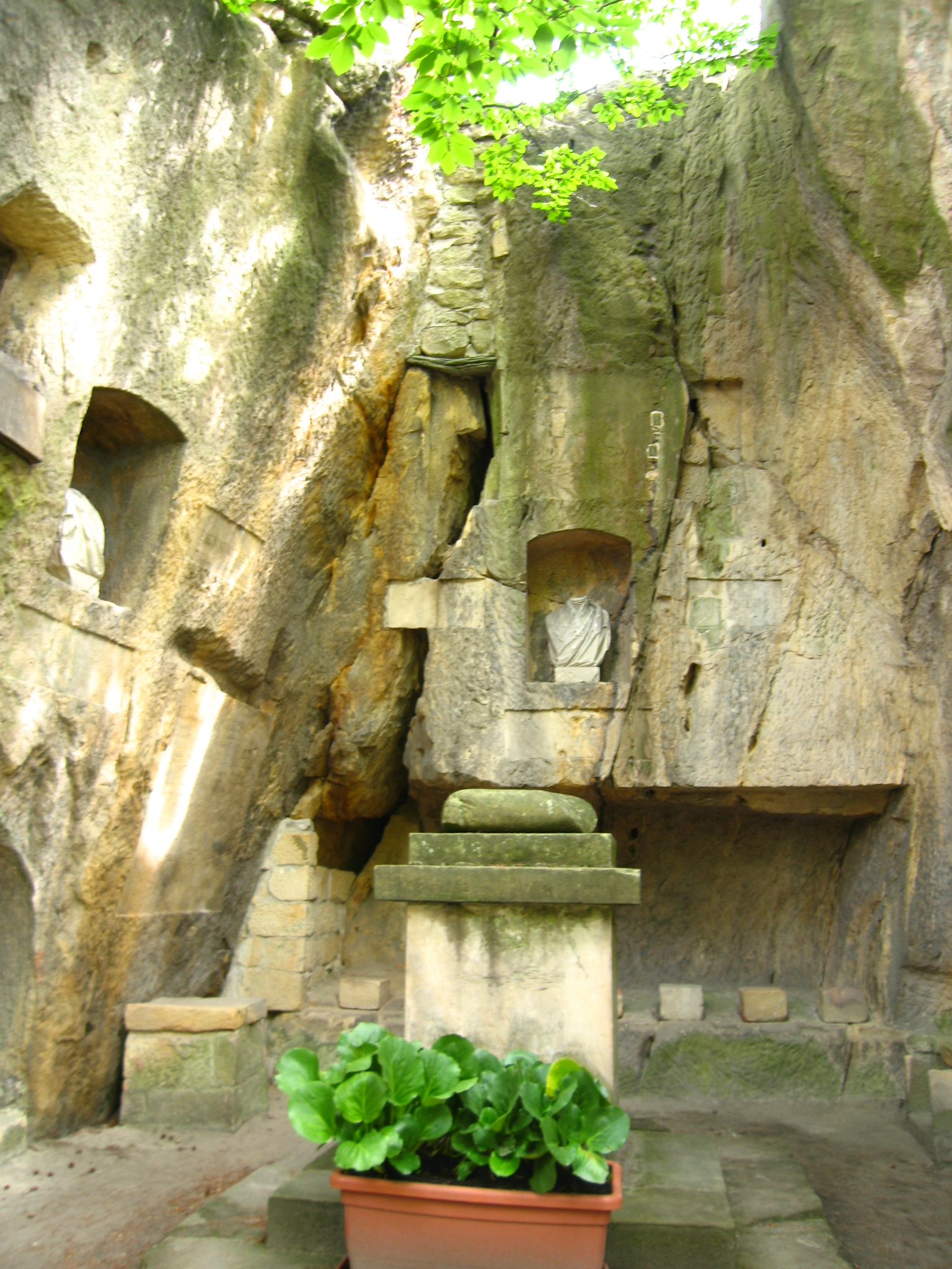 Zámek Vranov-Pantheon v Malé Skále.